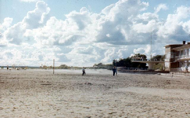 Пярнуский пляжСлайд снят в 1989 г.